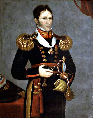 José María de la Cruz y Prieto (1799-1875). Militar y Político Chileno